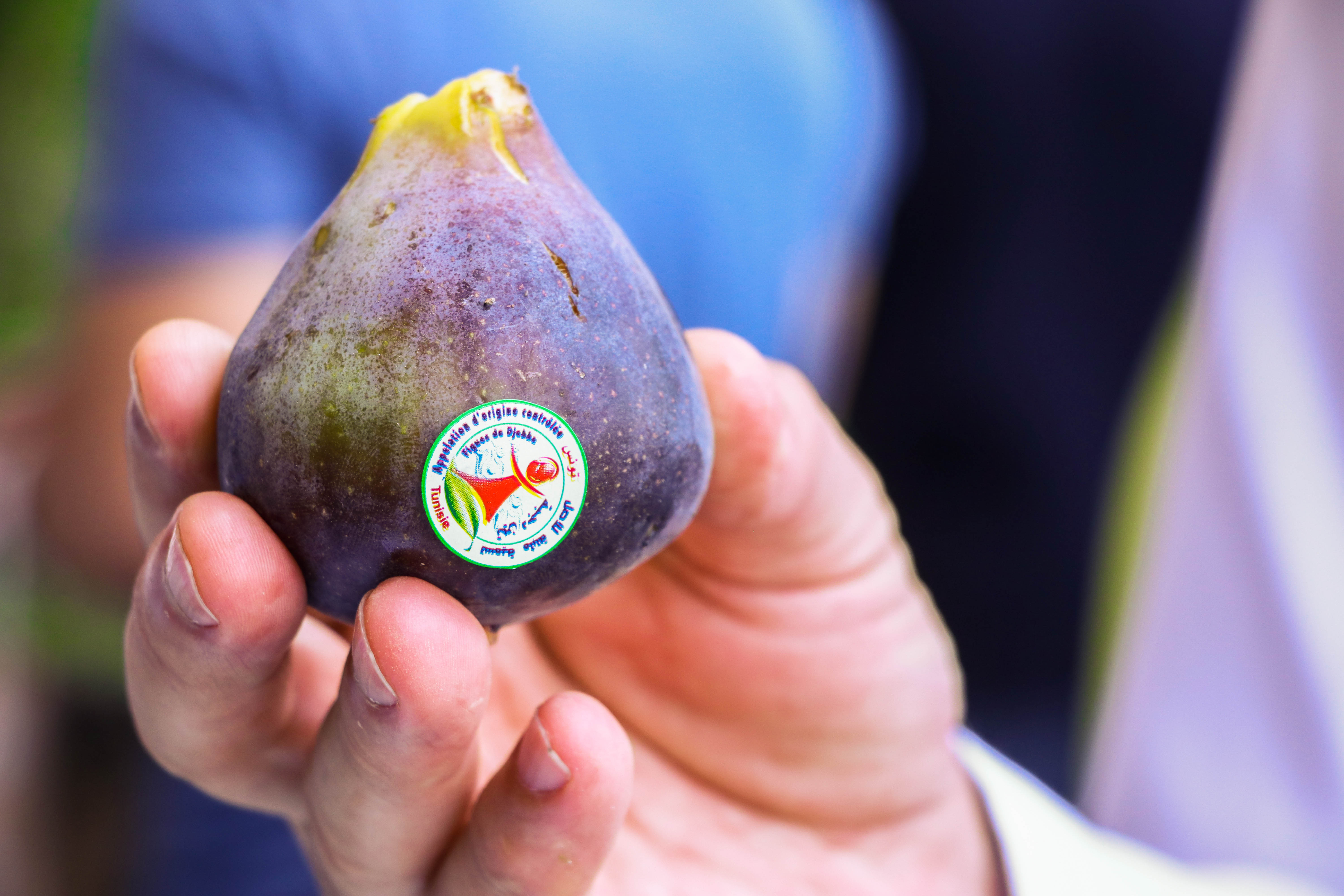 Figues de Djebba portant le label AOC